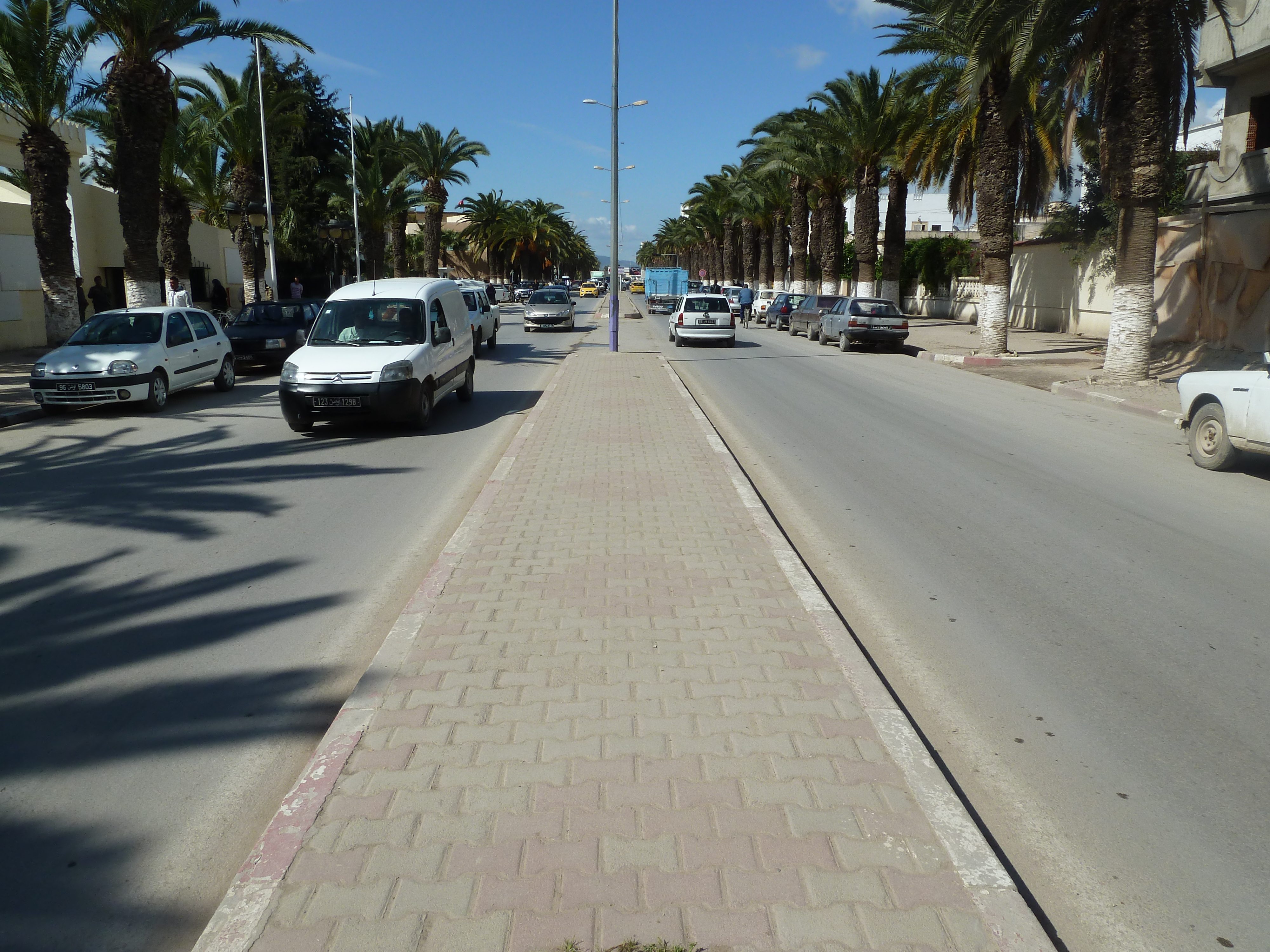 Grande artère à Jendouba, ville du centre ouest de la Tunisie